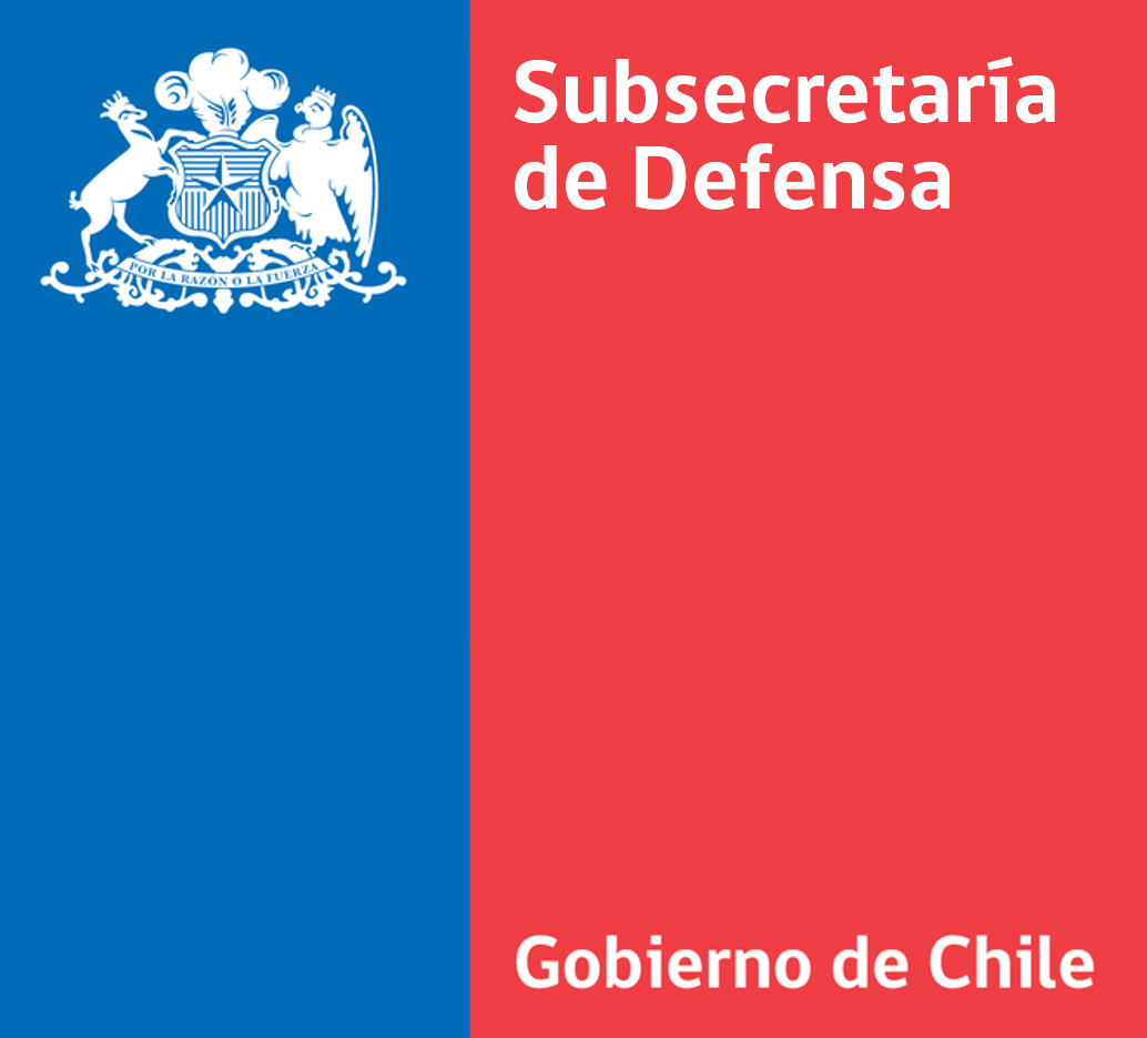 Logo Institucional de Subsecretaría de Defensa de Chile.